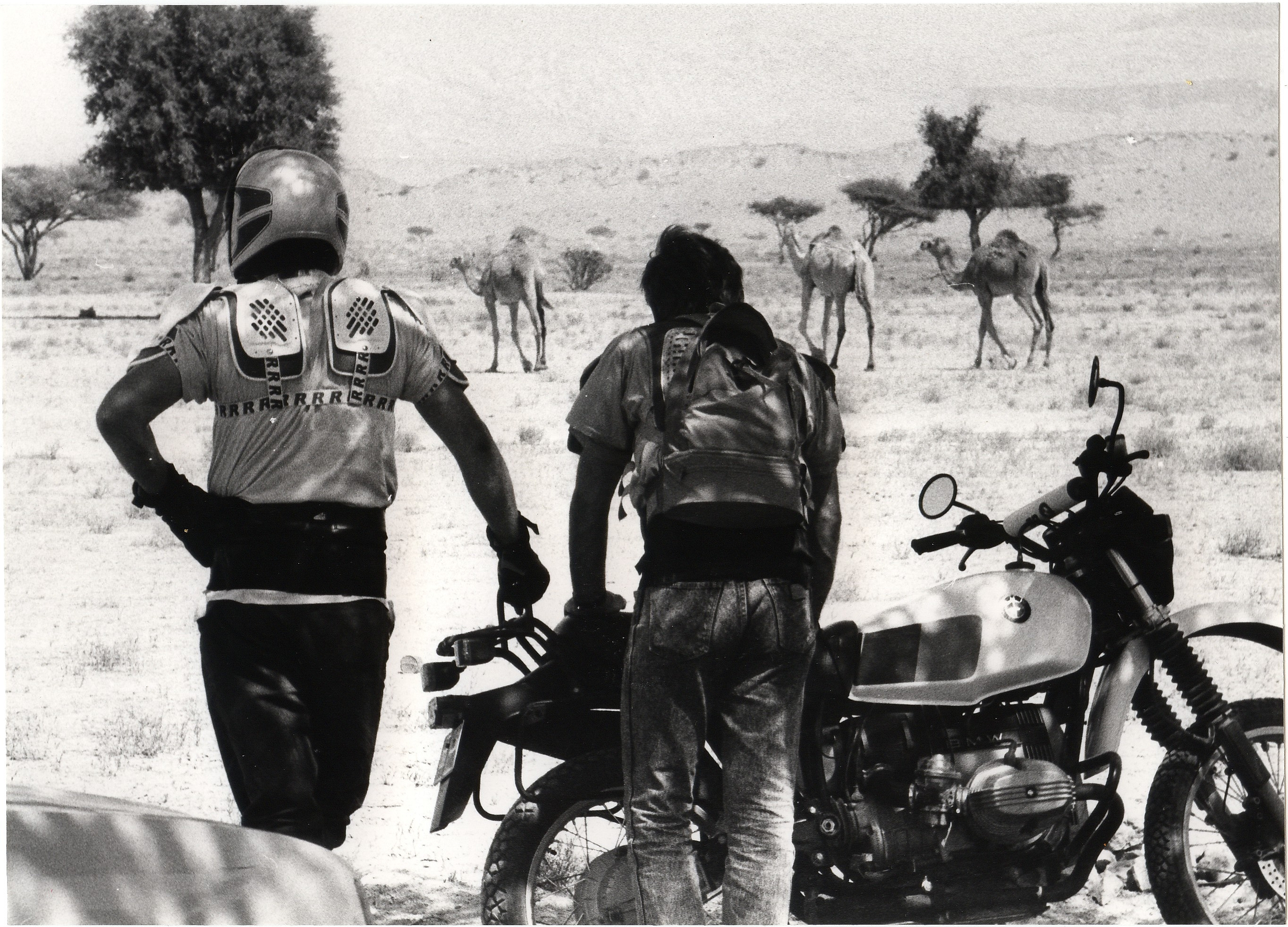 BMW R80 G/S de 1981. Photo prise en 1985 à ABU DHABI